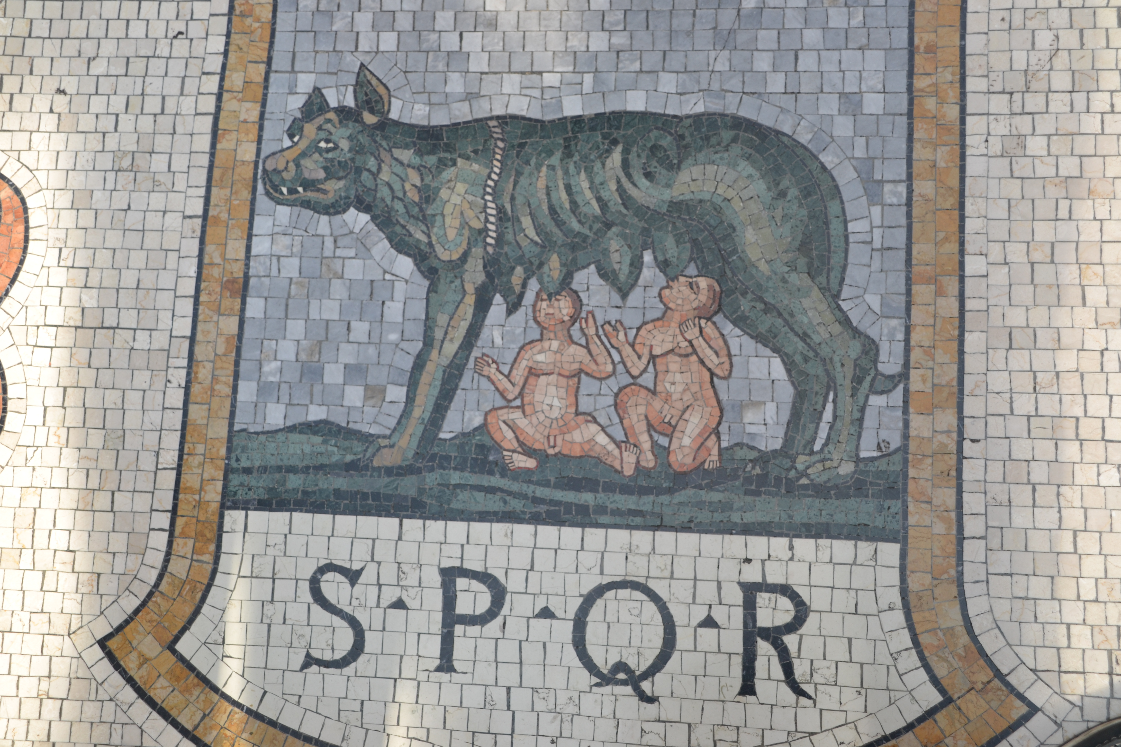 Dettaglio mosaico pavimento - Stemma di Roma - Galleria Vittorio Emanuele II - Milano This is a photo of a monument which is part of cultural heritage of Italy.